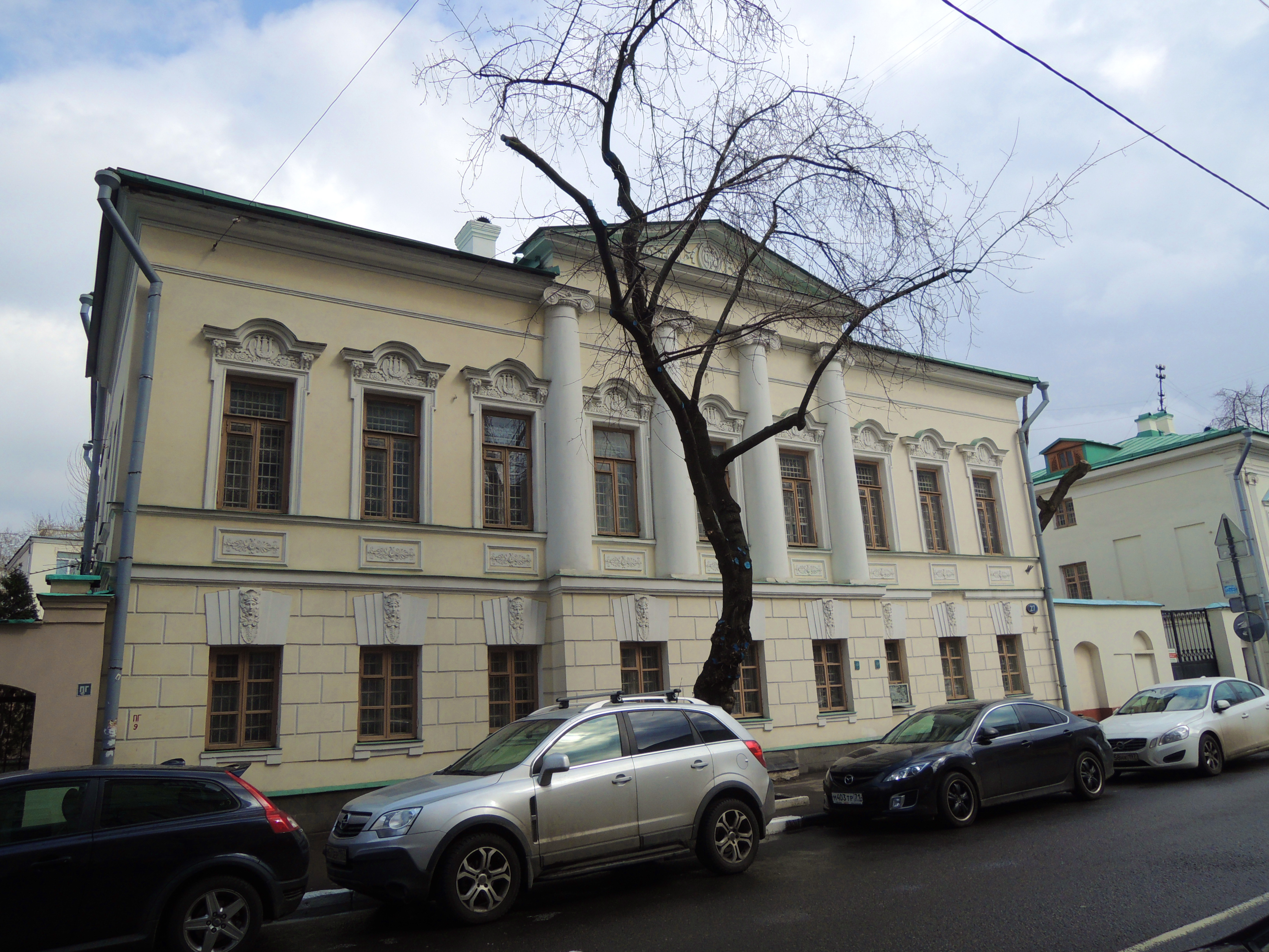 ул. Бахрушина, 27 Бывшая городская усадьба Варгина-Одинцовых Постройка XVIII—XIX века, ограда 1895 года.